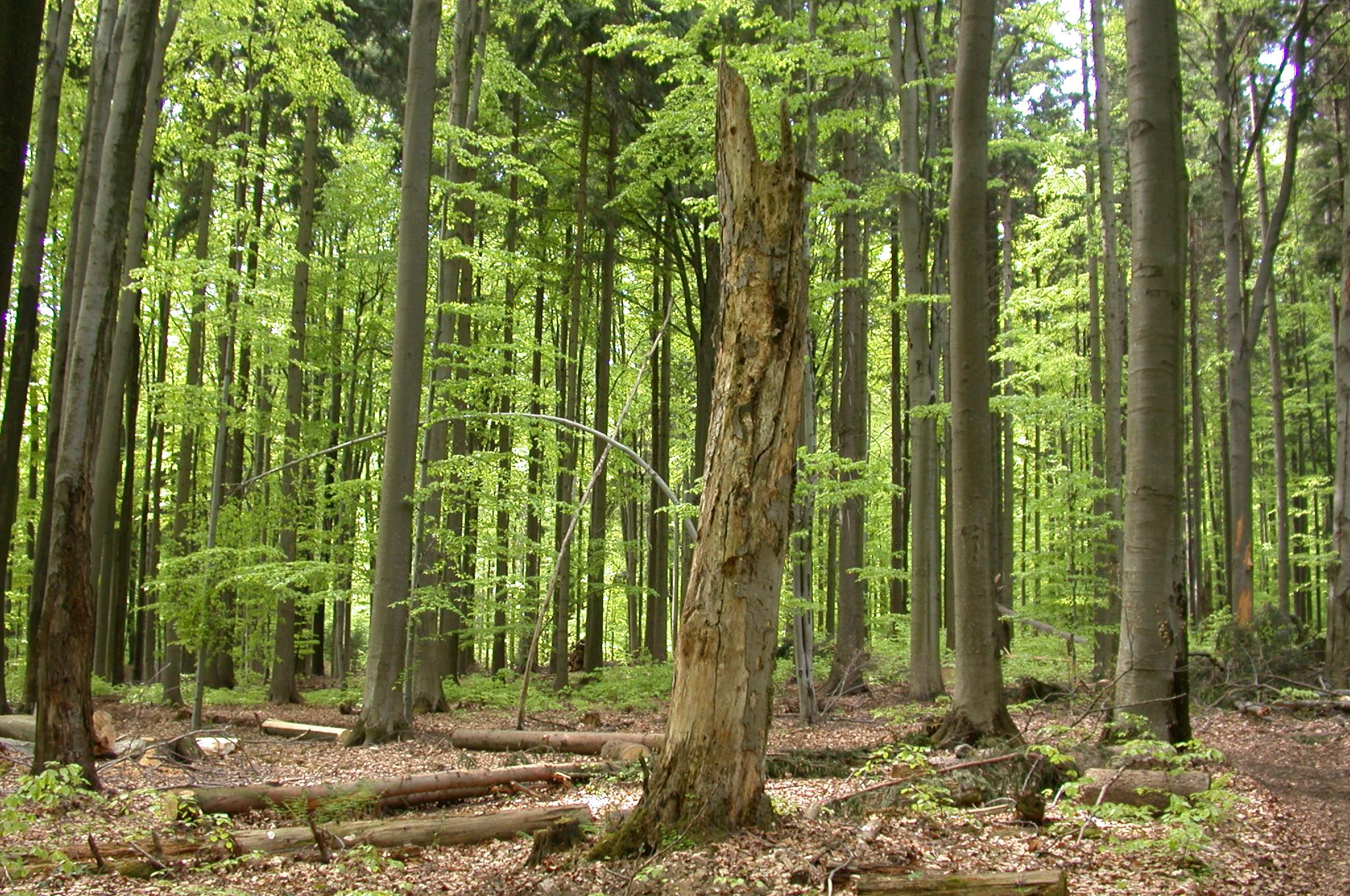 Selský les